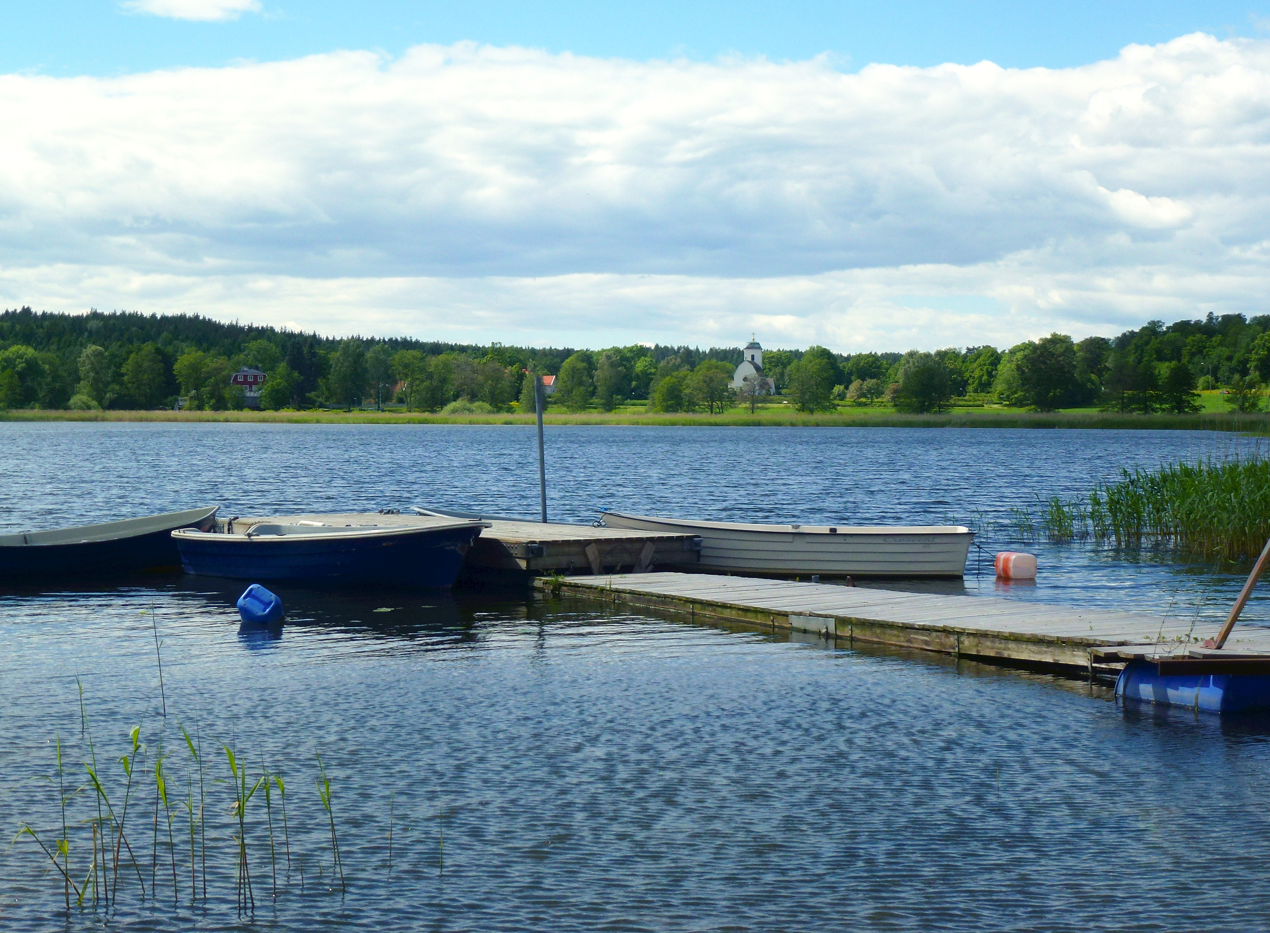 Eds kyrka med Edssjön i förgrunden